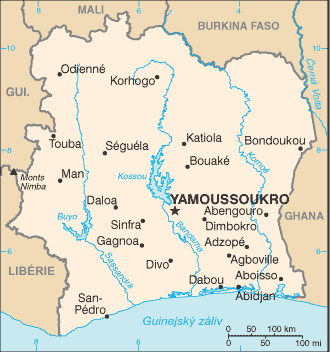 Mapa Côte d'Ivoire - přeložená mapa z CIA World Factbook.